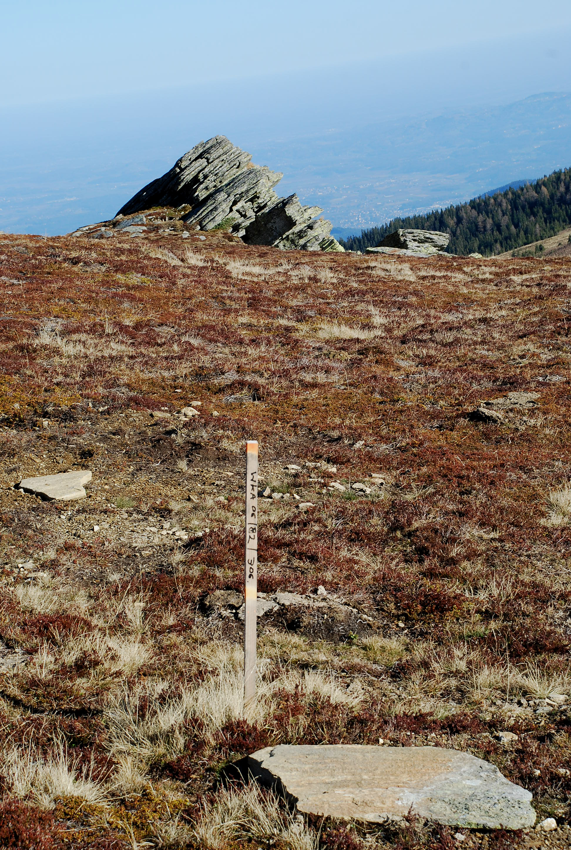 Handalm, Koralpe, Österreich: Berg und umgebende Landschaft (Almgebiet) in der mittleren Koralpe, ab 2014 Standort des Windparks Handalm